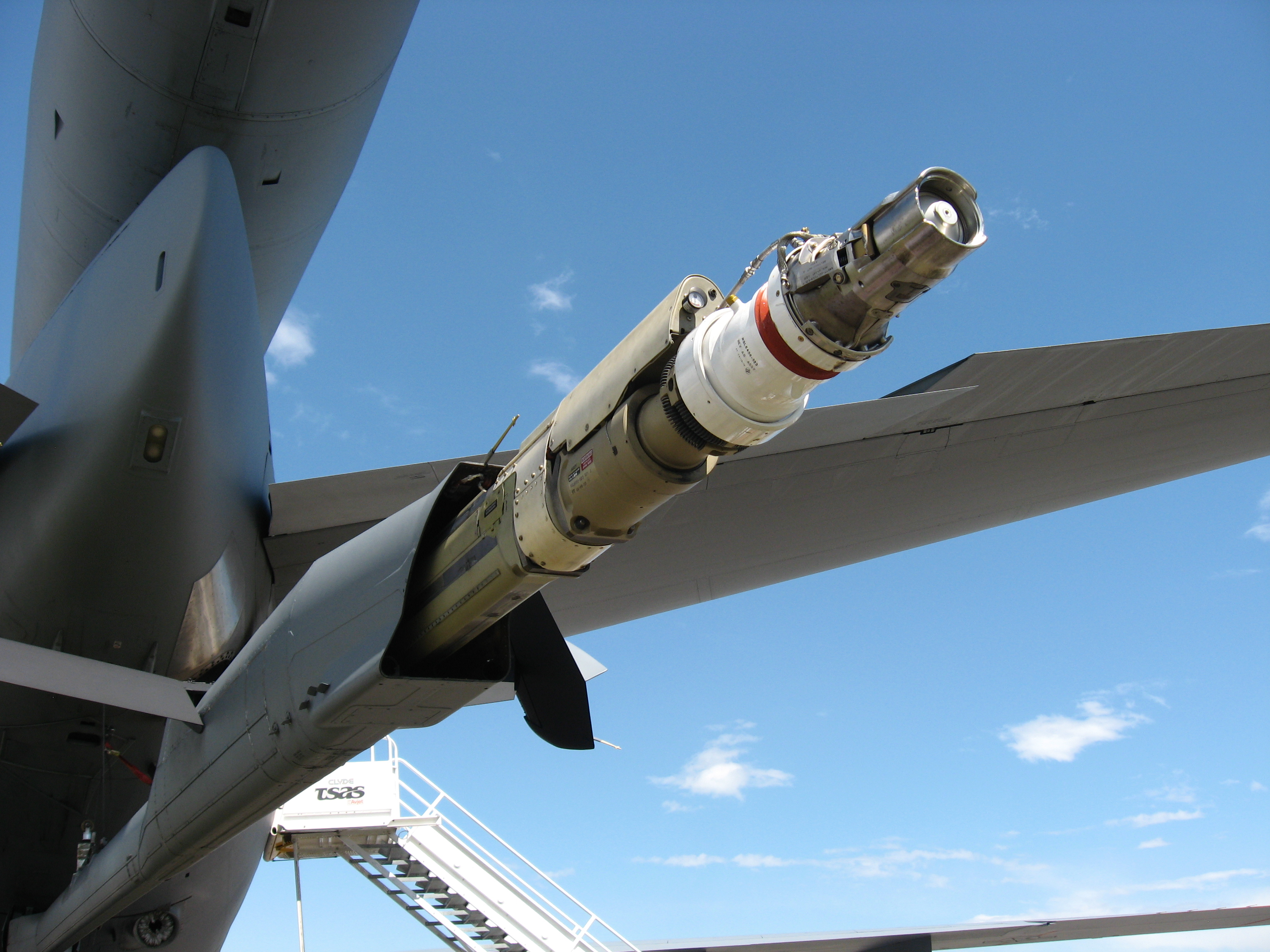 Perche rigide rétractable pour le ravitaillement sur un McDonnell Douglas KC-10.